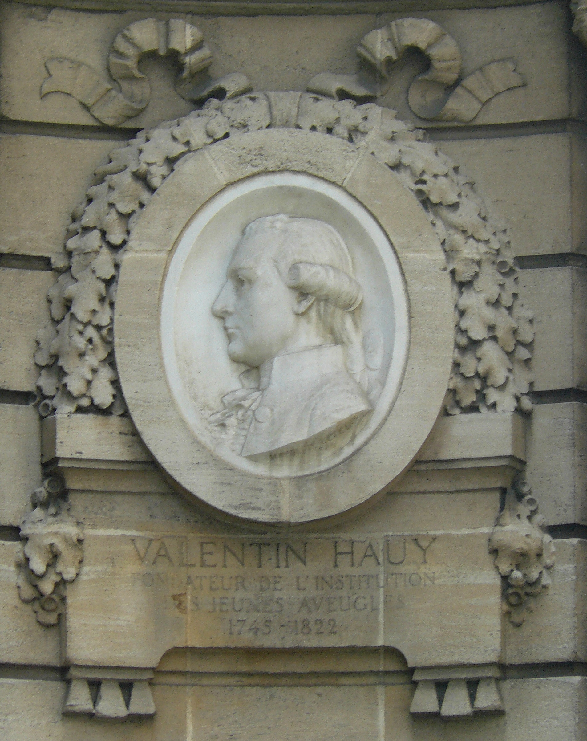 Fontaine du Puits de Grenelle, Place Georges Mulot, Paris XVème - médaillon décorant une face de la fontaine et représentant Valentin Haüy